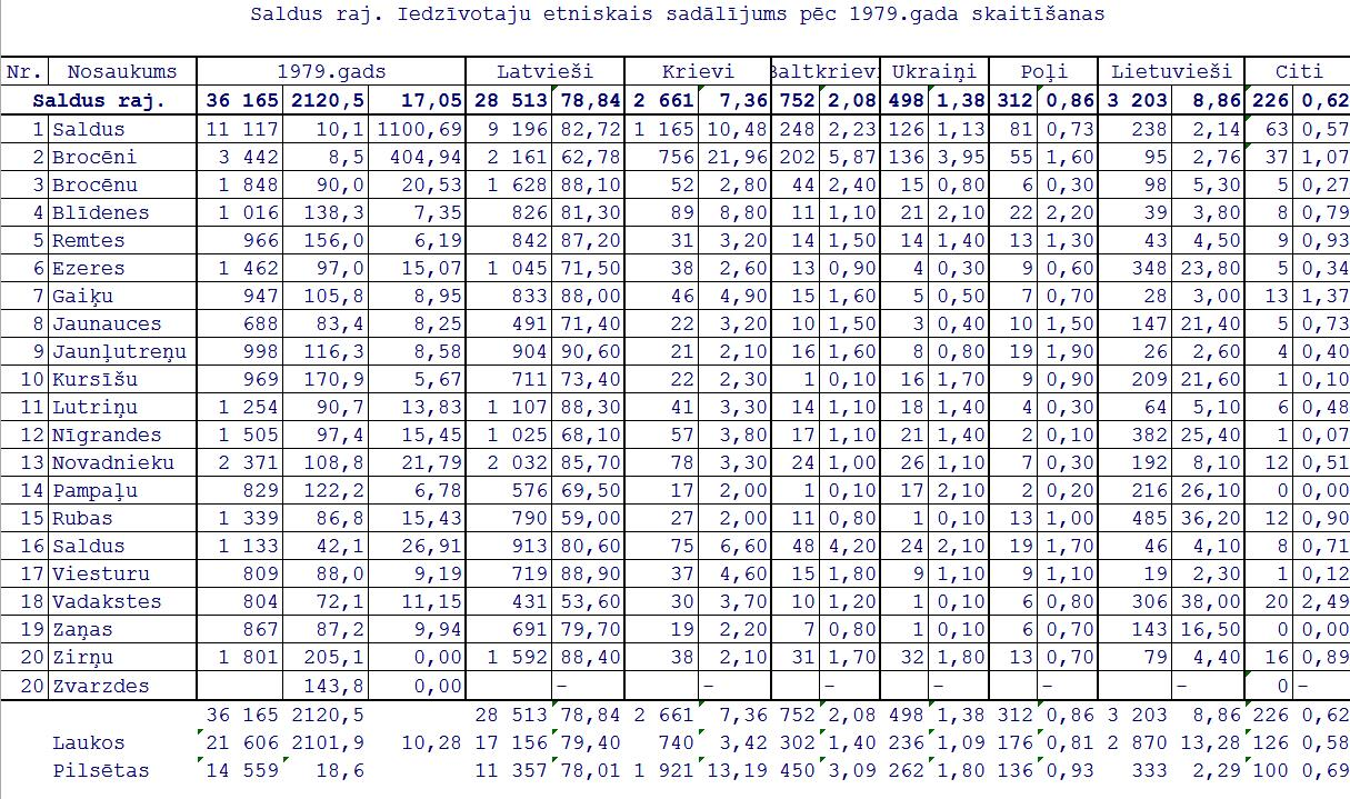 Latvijas 1979. gada tautas skaitīšanas dati